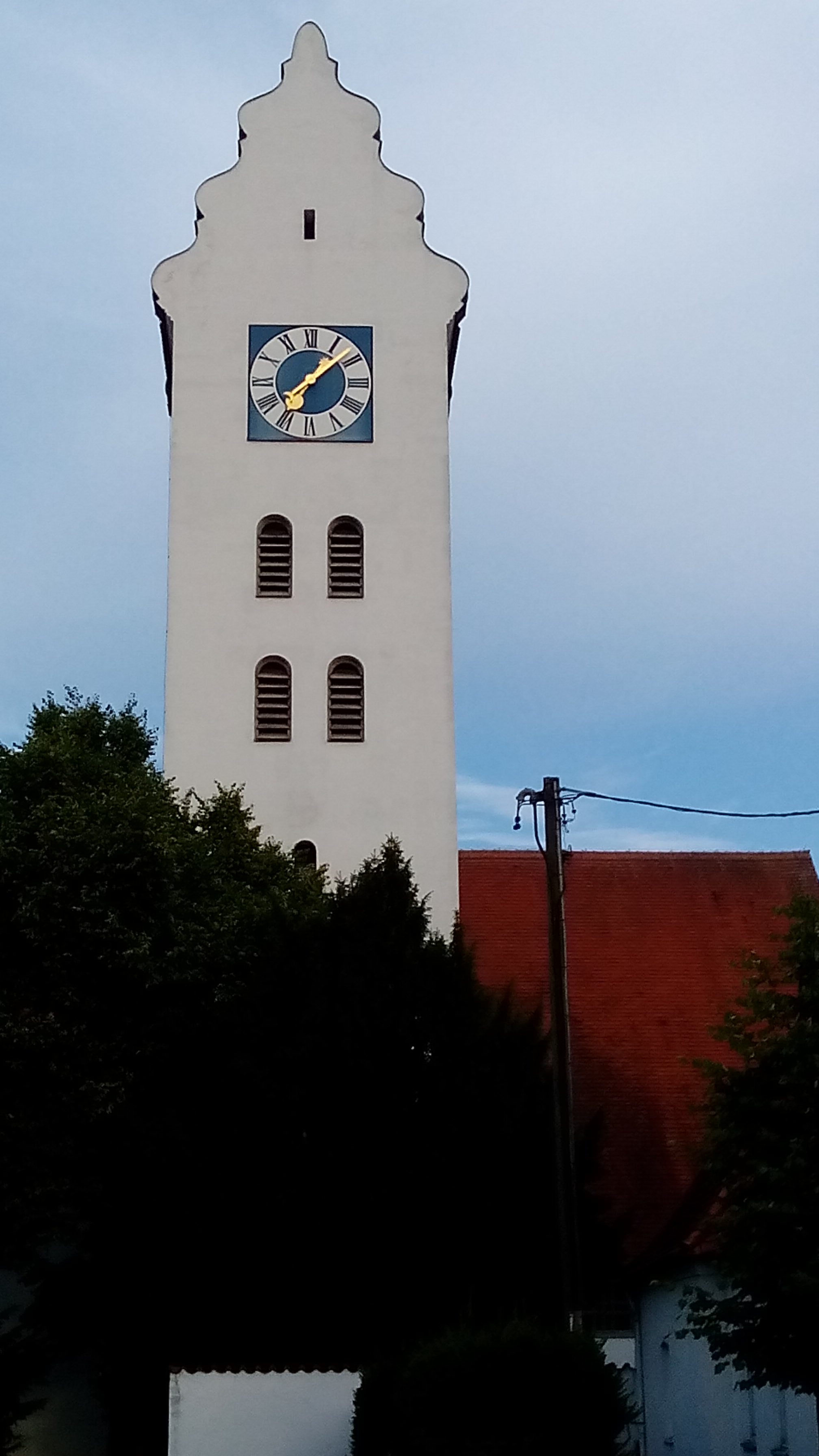 katholische Pfarrkirche St. Bartholomäus in Oberstimm